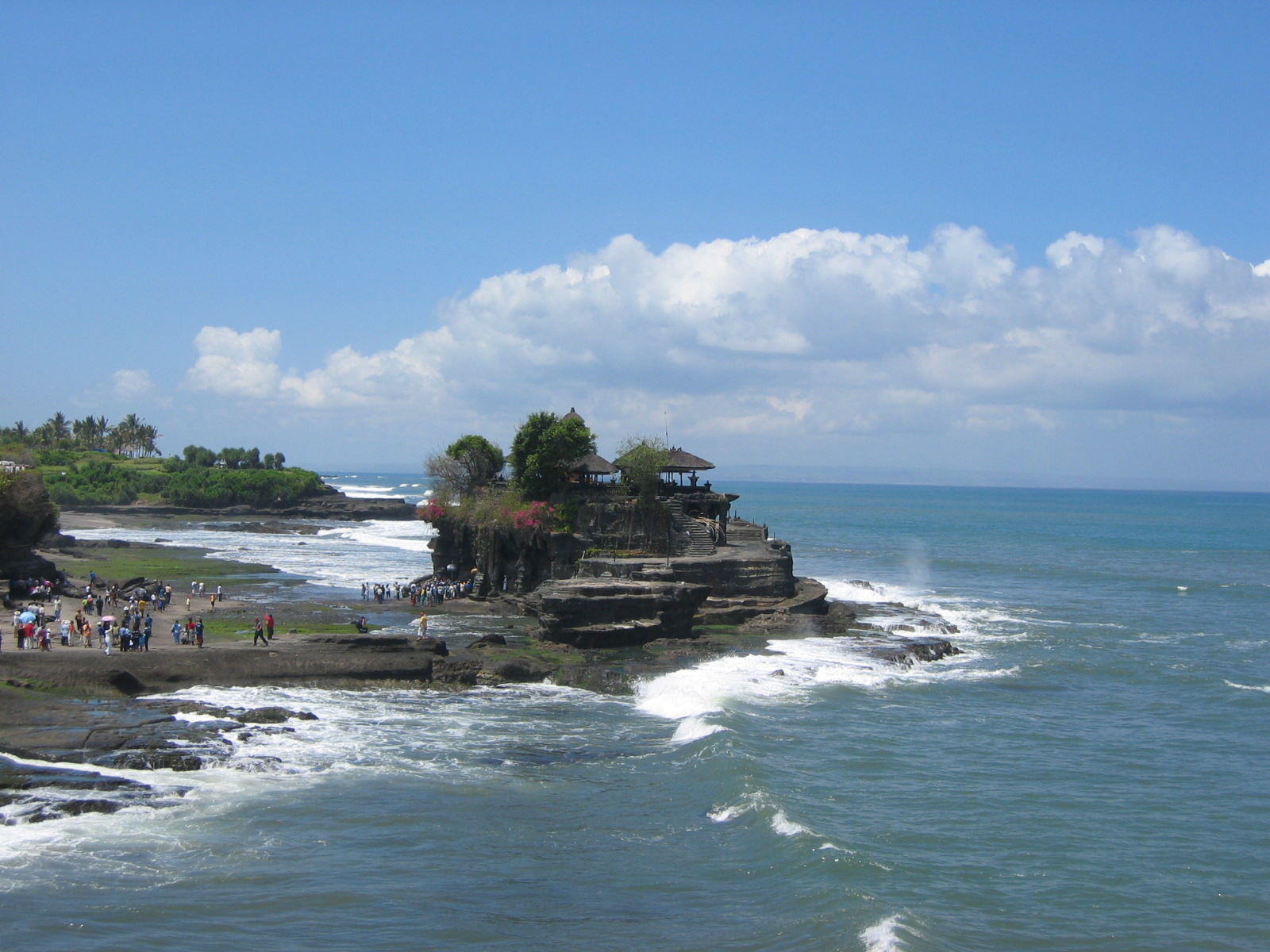 Der Tempel Tanah Lot auf Bali, Indonesien